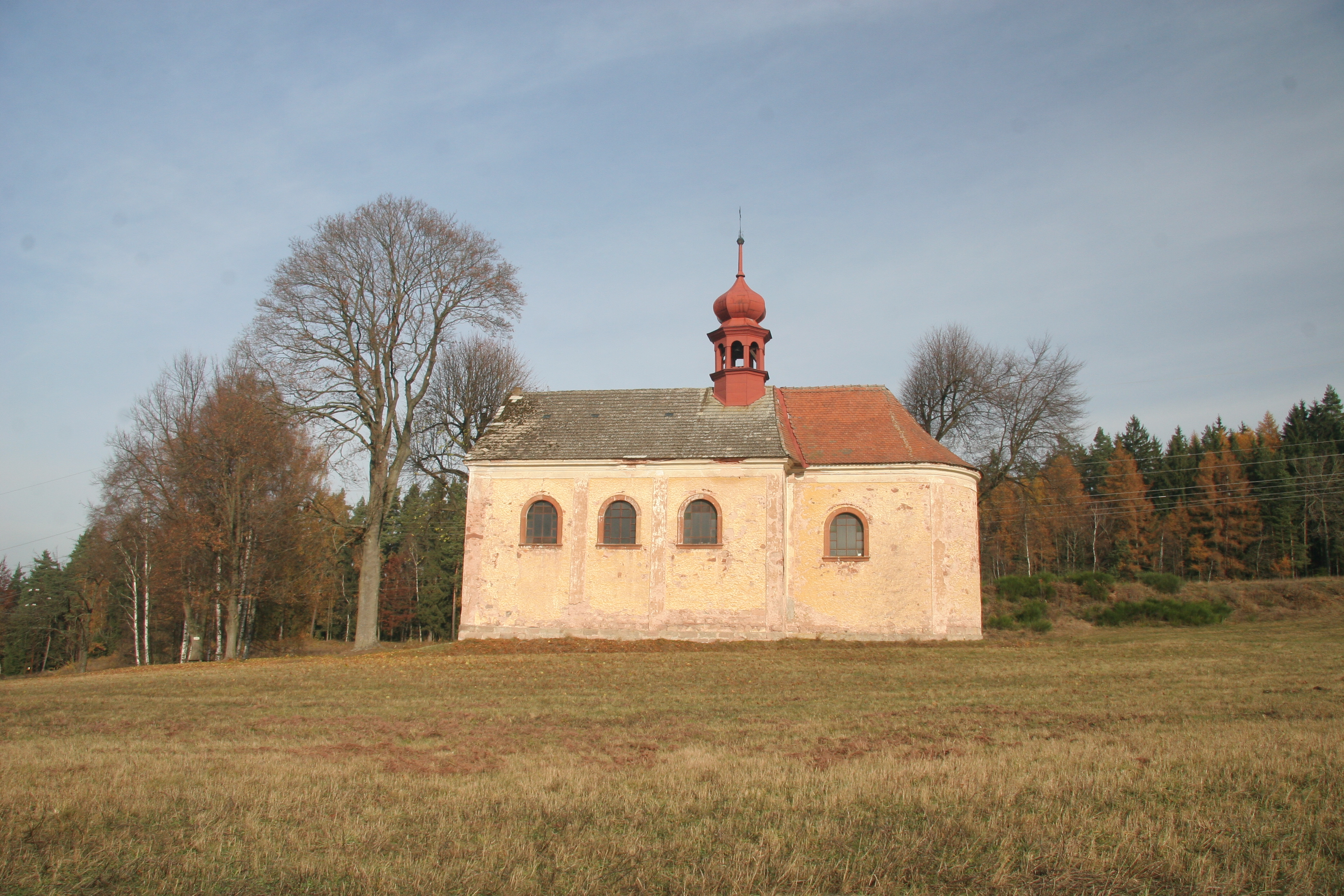 Kostel sv. Maří Magdalény (Stupná), Stupná